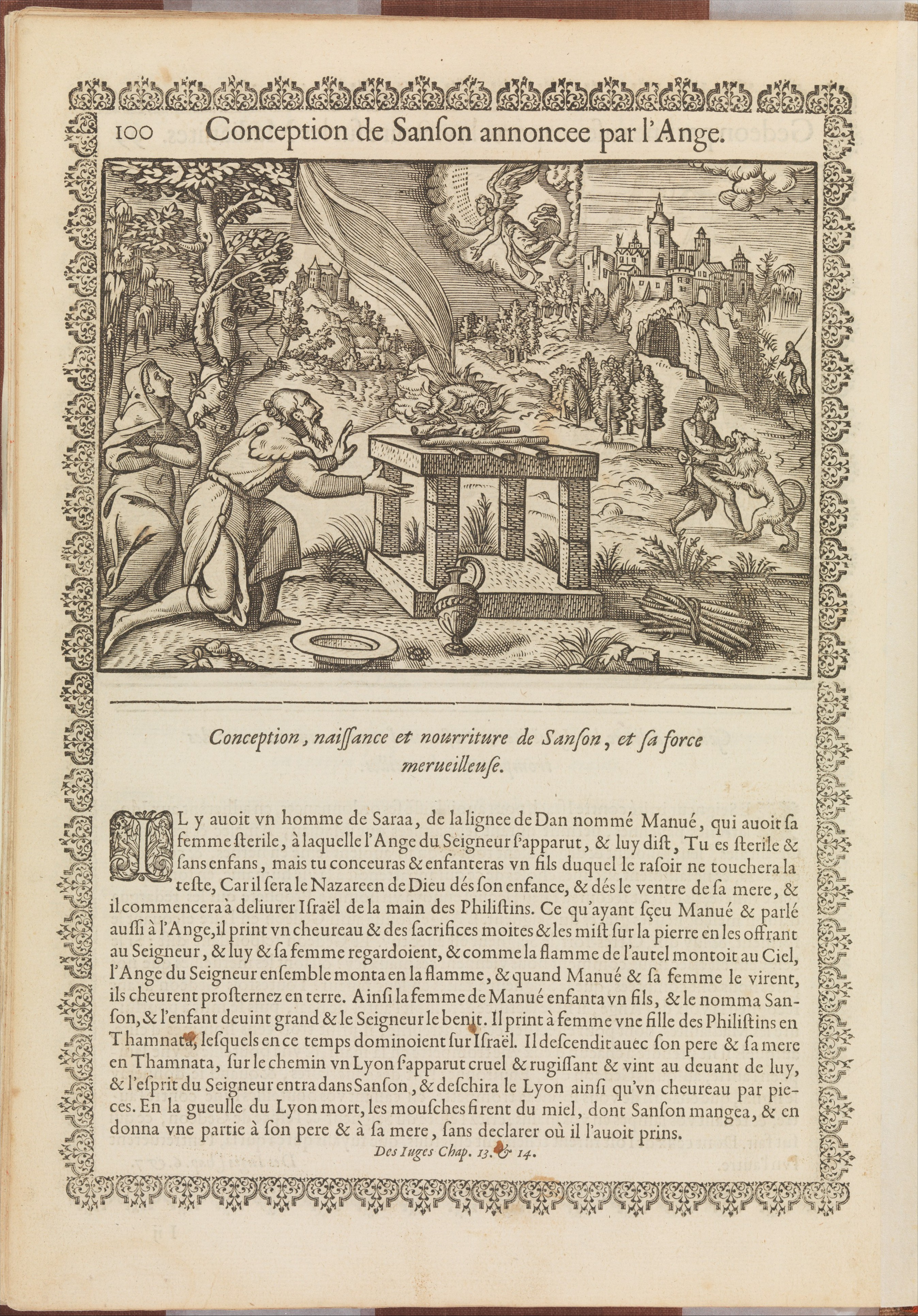 Book; Books